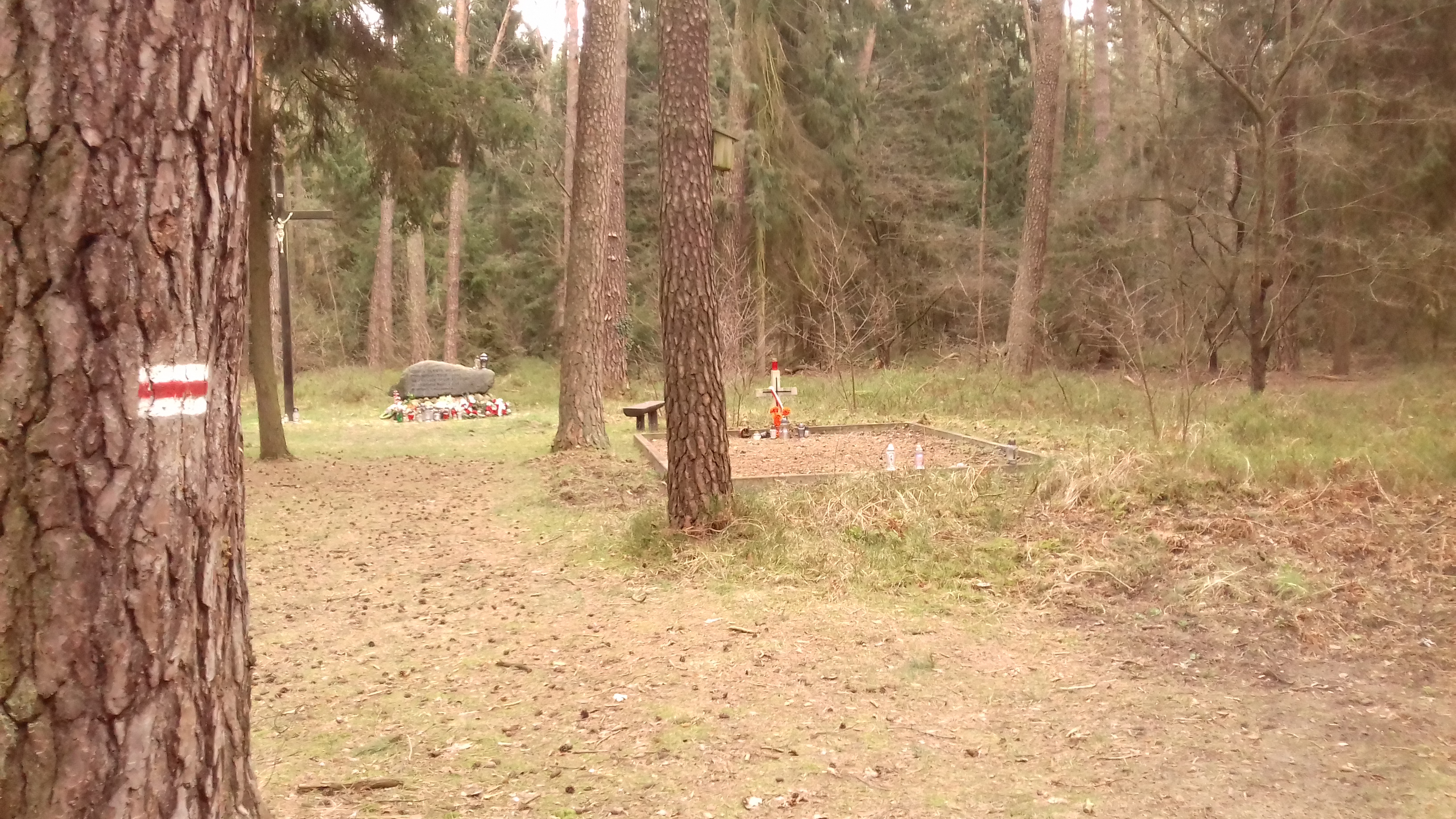 Miejsce pamięci ofiar zbrodni nazistowskiej w lesie Bogulin, w pobliżu Nowinek, w formie obramowanego grobu z krzyżem